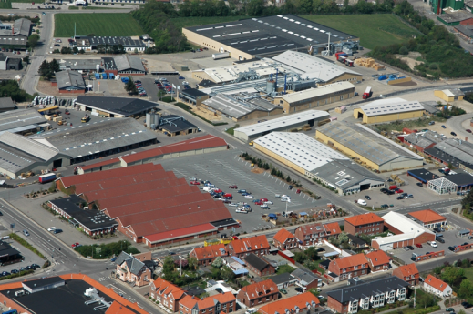 Hovedkontoret og hovedlageret i Ringkøbing